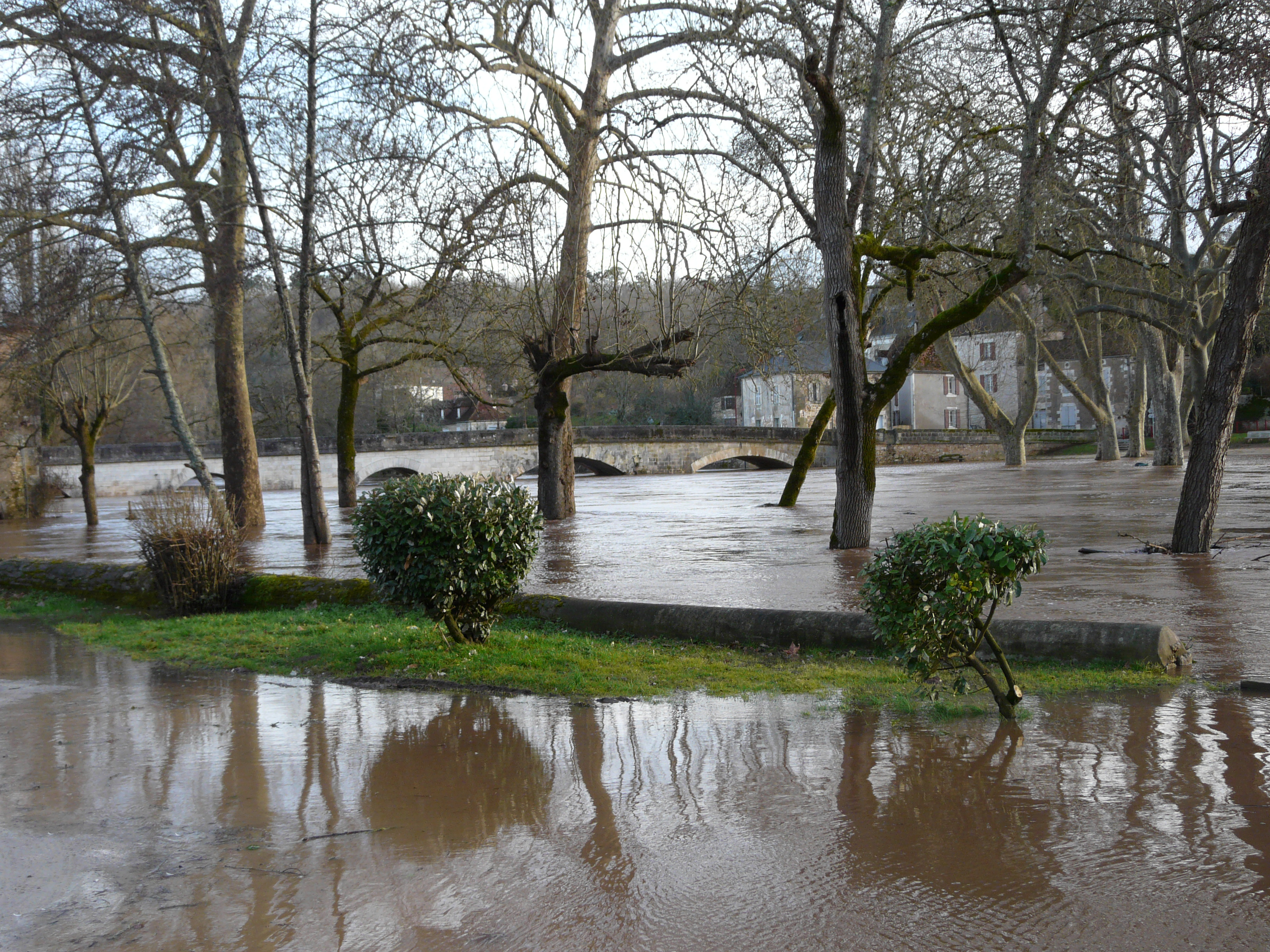 Crue de l'Auvézère à Cubjac, Dordogne, France